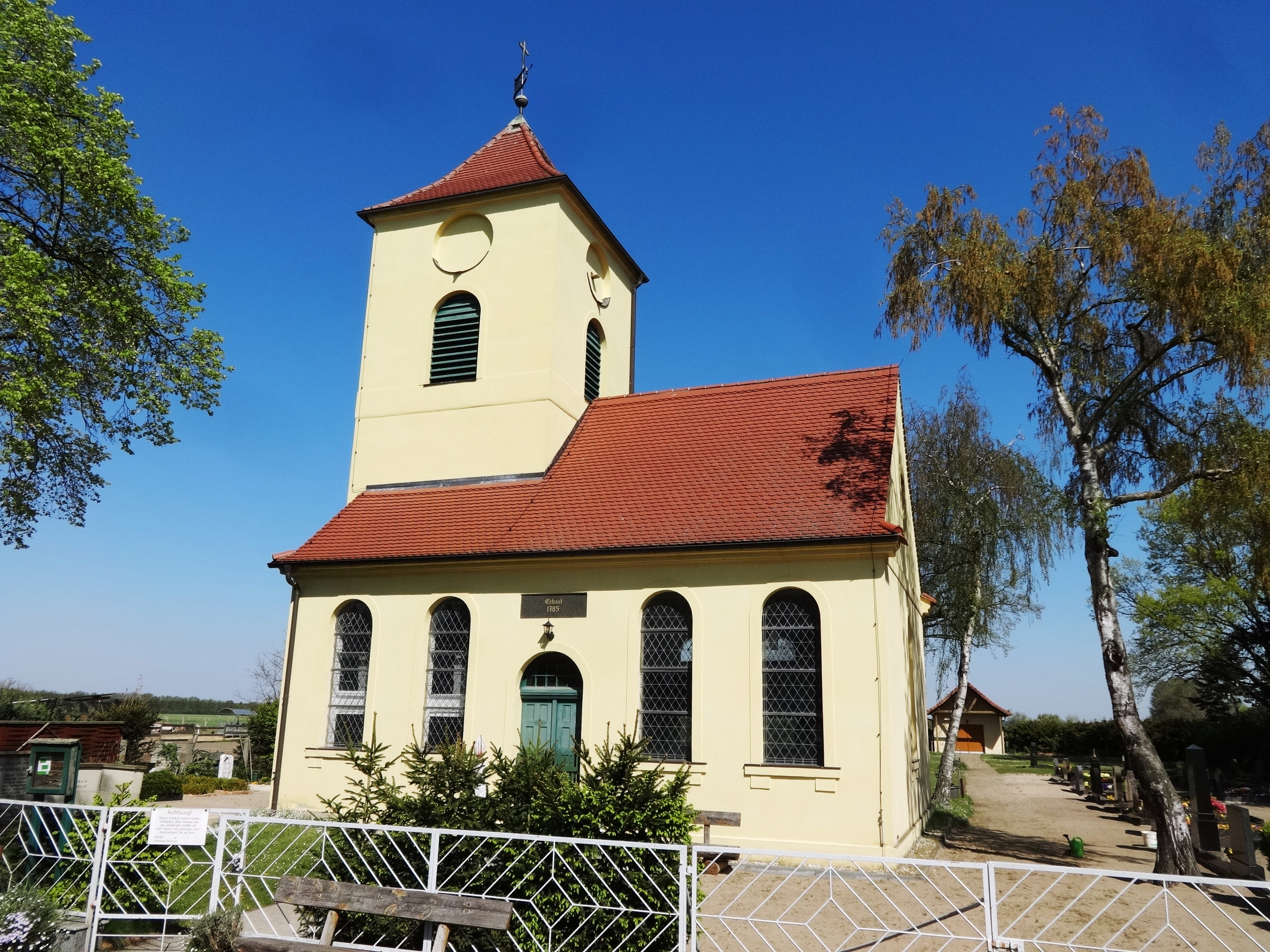 Die evangelische Dorfkirche Salzbrunn ist eine Saalkirche, die in den Jahren 1784/1785 von den Pfälzer Siedlern errichtet wurde. In den Jahren 2003 und 2004 erfolgte eine umfangreiche Sanierung. Im Innern befindet sich eine schlichte Ausstattung aus der Bauzeit.